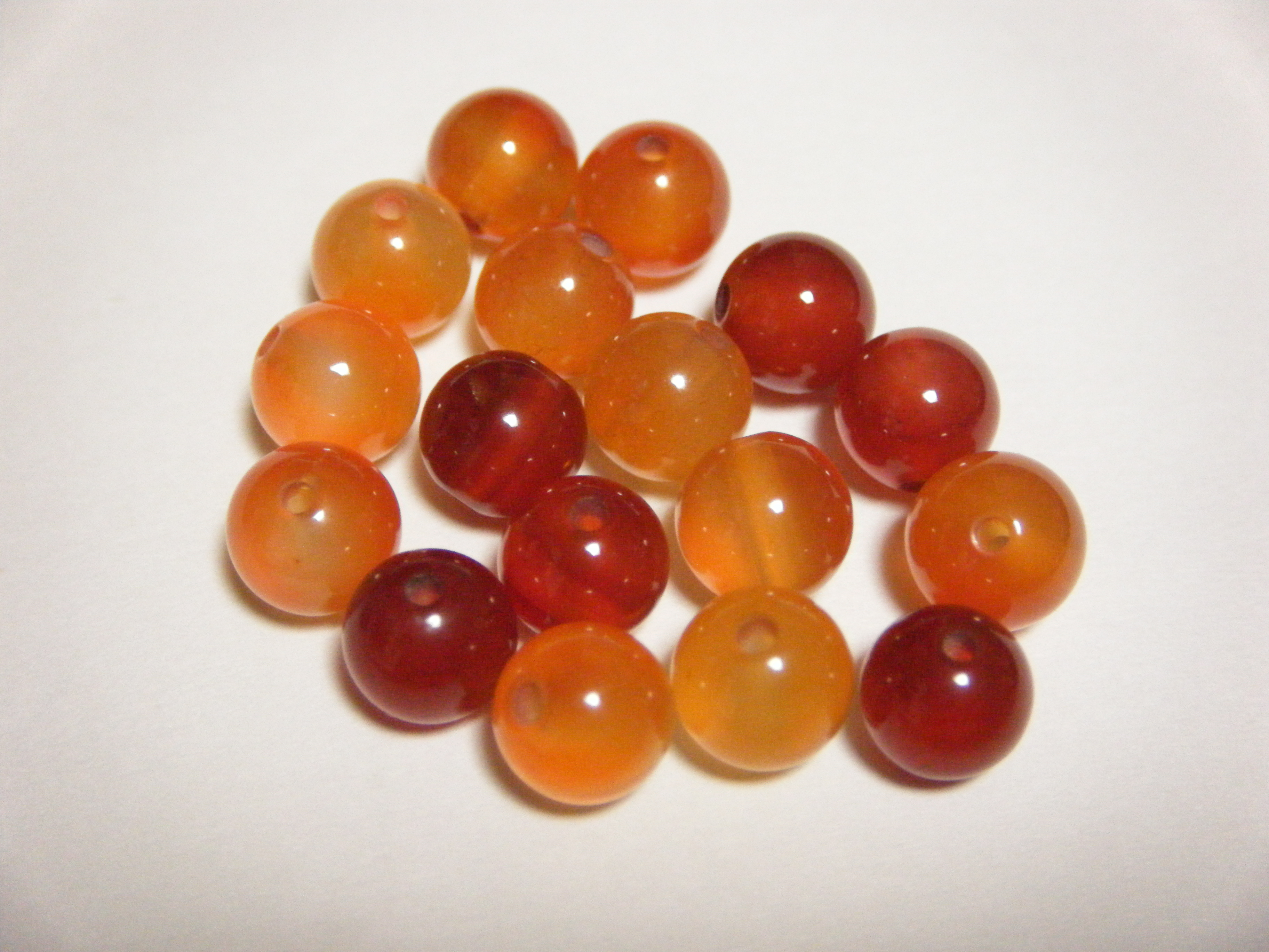 カーネリアン。手芸用に小さな穴があいているもの。